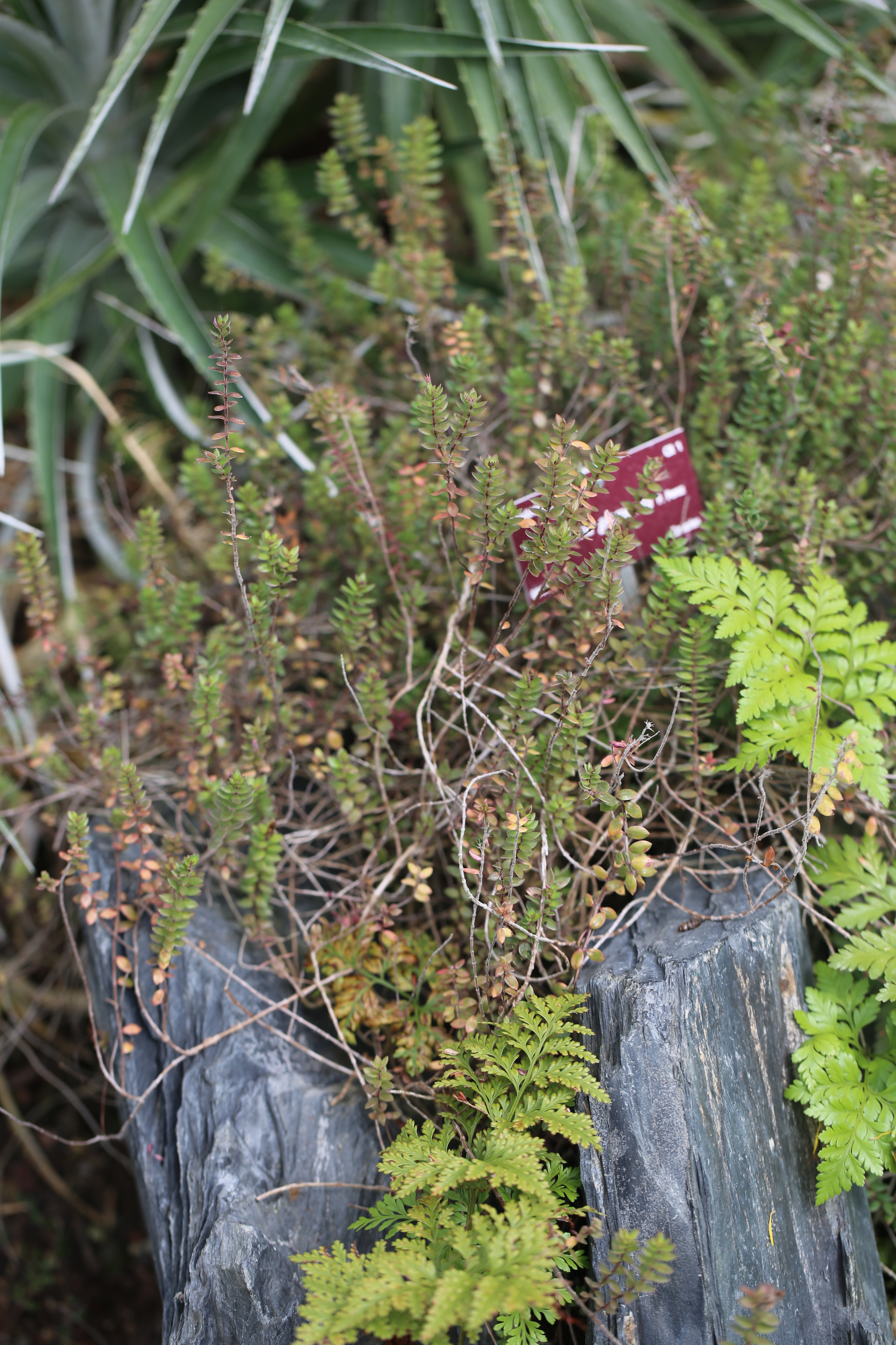 Espèce Micromeria Glomerata au Conservatoire botanique national de Brest